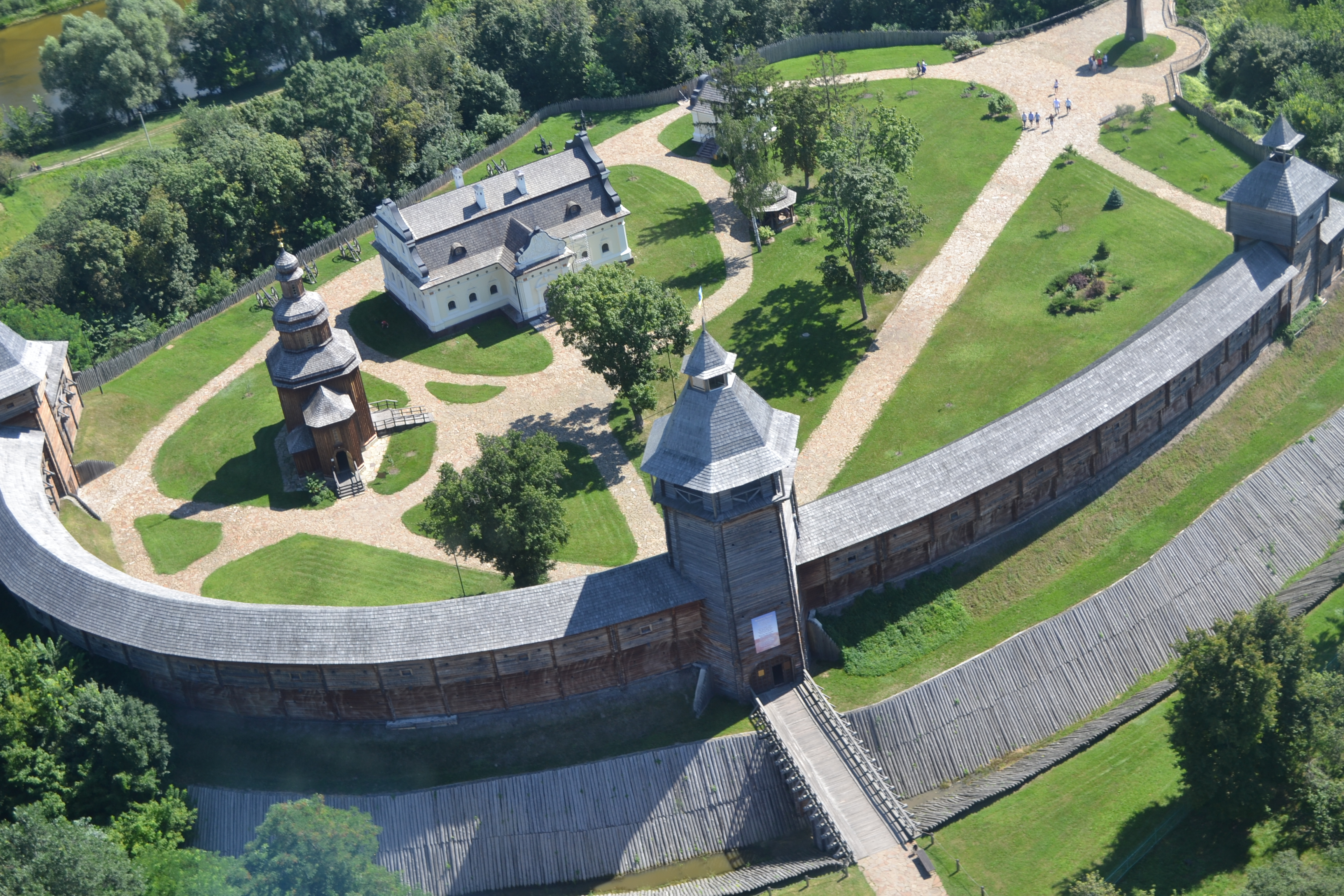 Територія архітектурно-меморіального комплексу Цитадель Батуринської фортеці